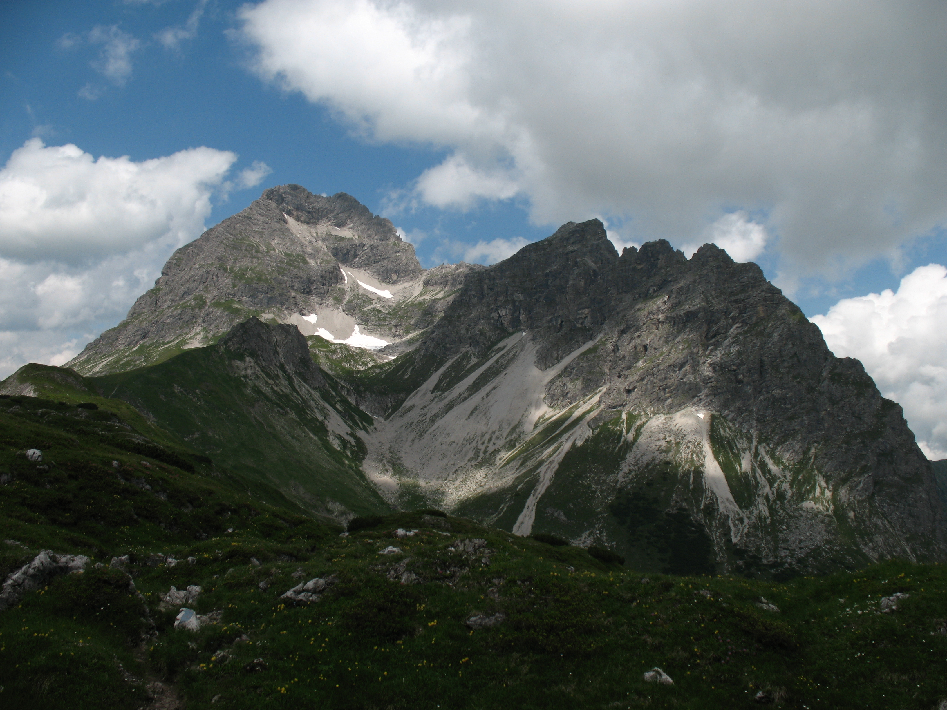 Ostansicht des Großen Widderstein (2533 m).